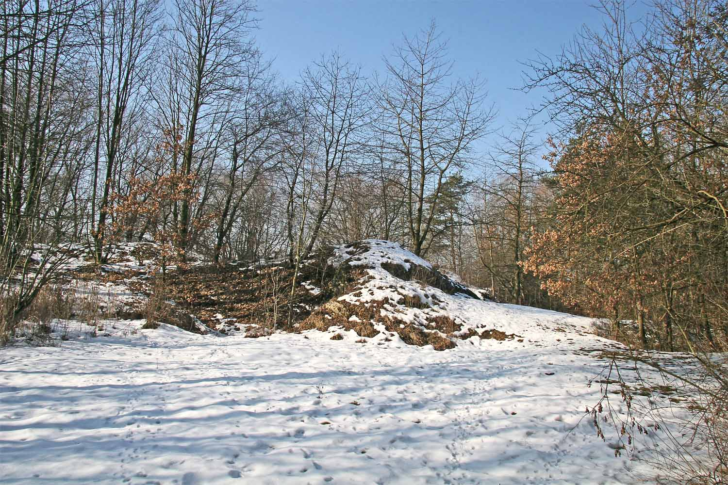 Přírodní památka Žehušická skalka